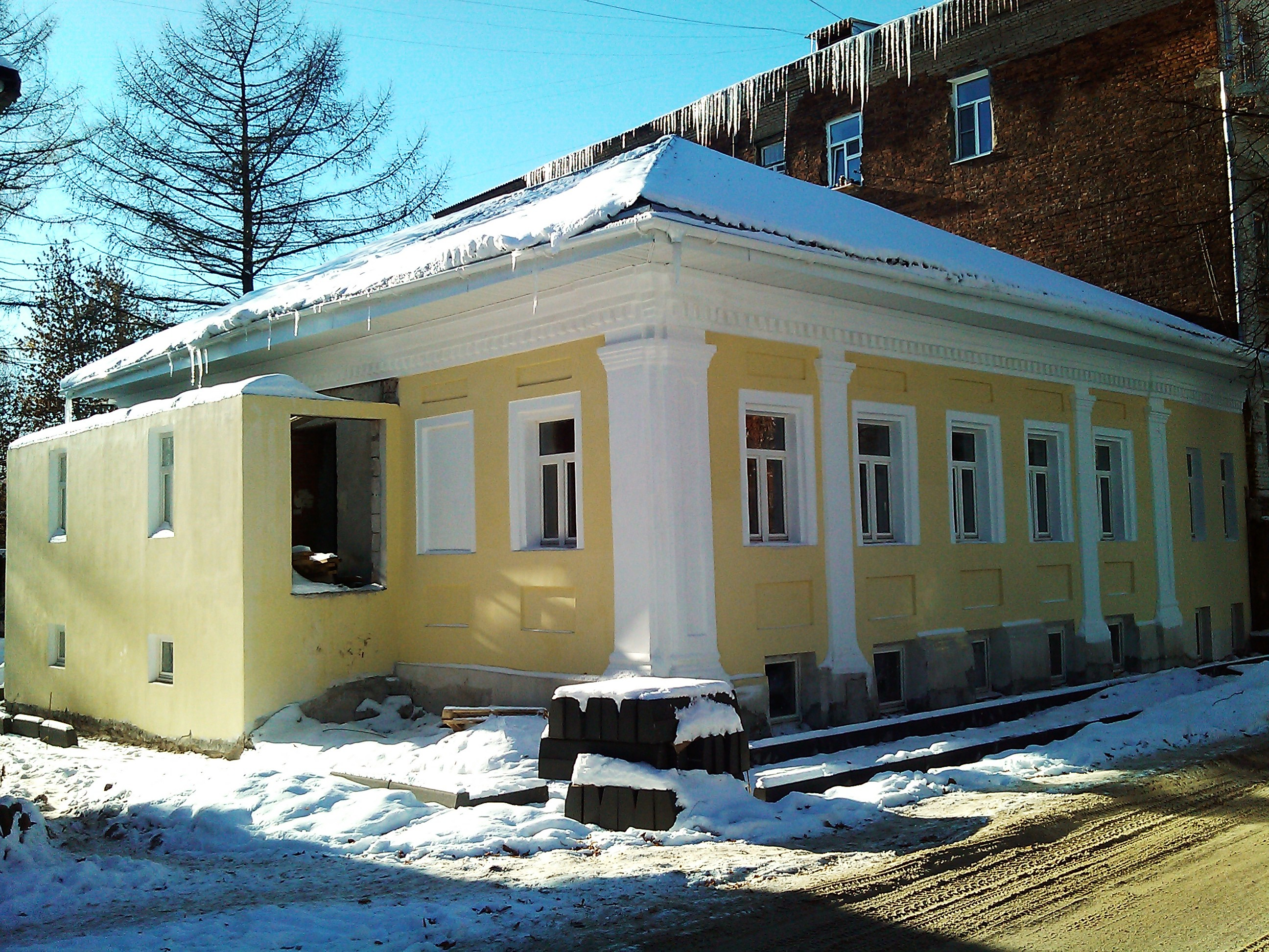 Бывший жилой дом Епархиального училища в октябре 2014 года